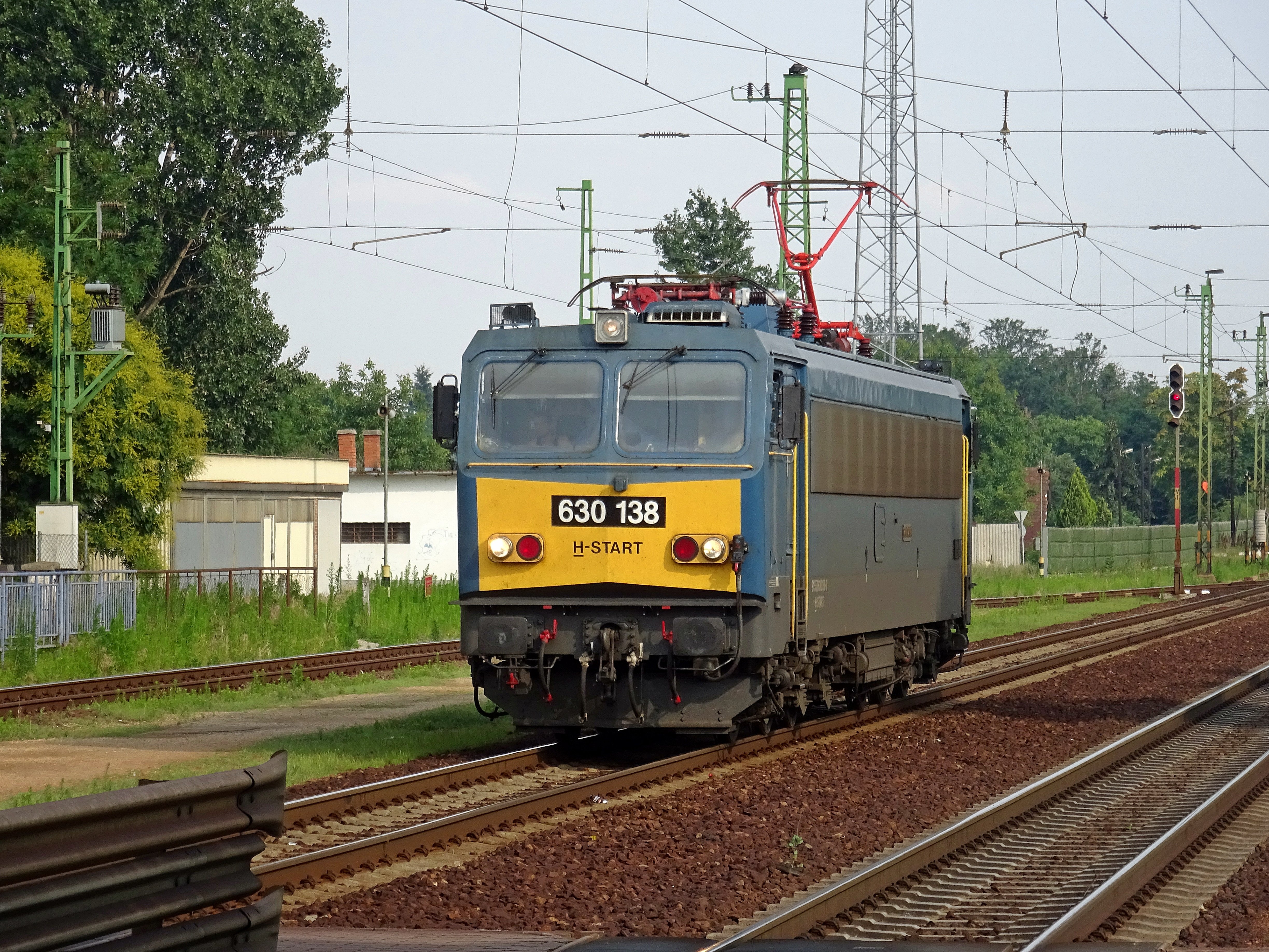 A Kandó Kálmán nevét viselő Gigant, a 630 138 Pilisen.